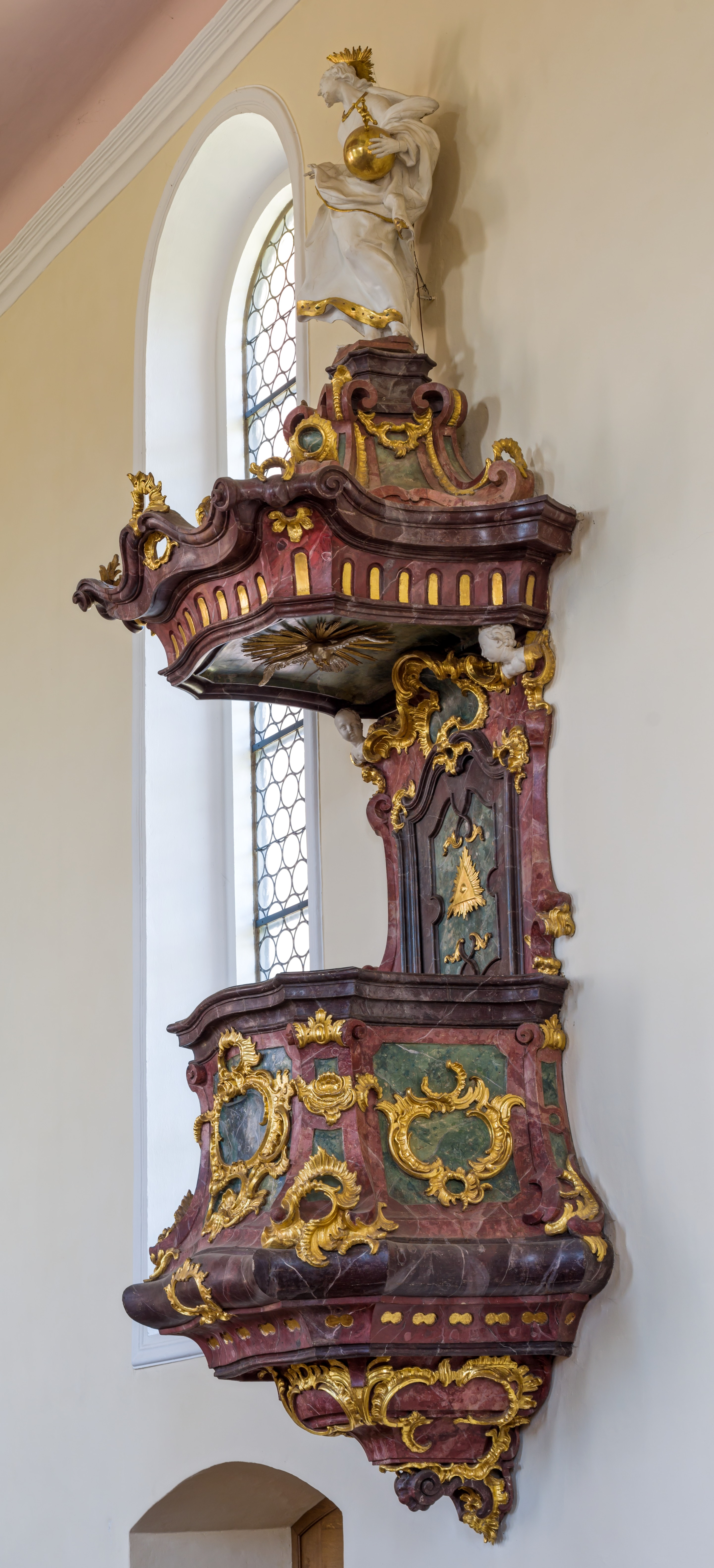 Bilder aus Oberried Die Kanzel